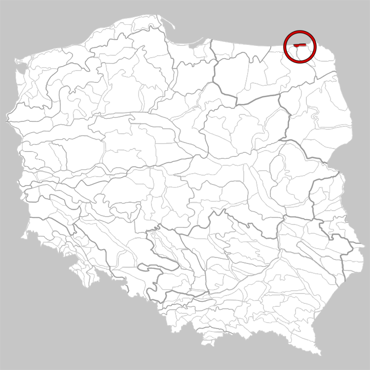 Physico-geographical regionalization of Poland Mezoregion 842.71 Rominte Primeval Forest Regionalizacja fizycznogeograficzna Polski Mezoregion 842.71 Puszcza Romincka